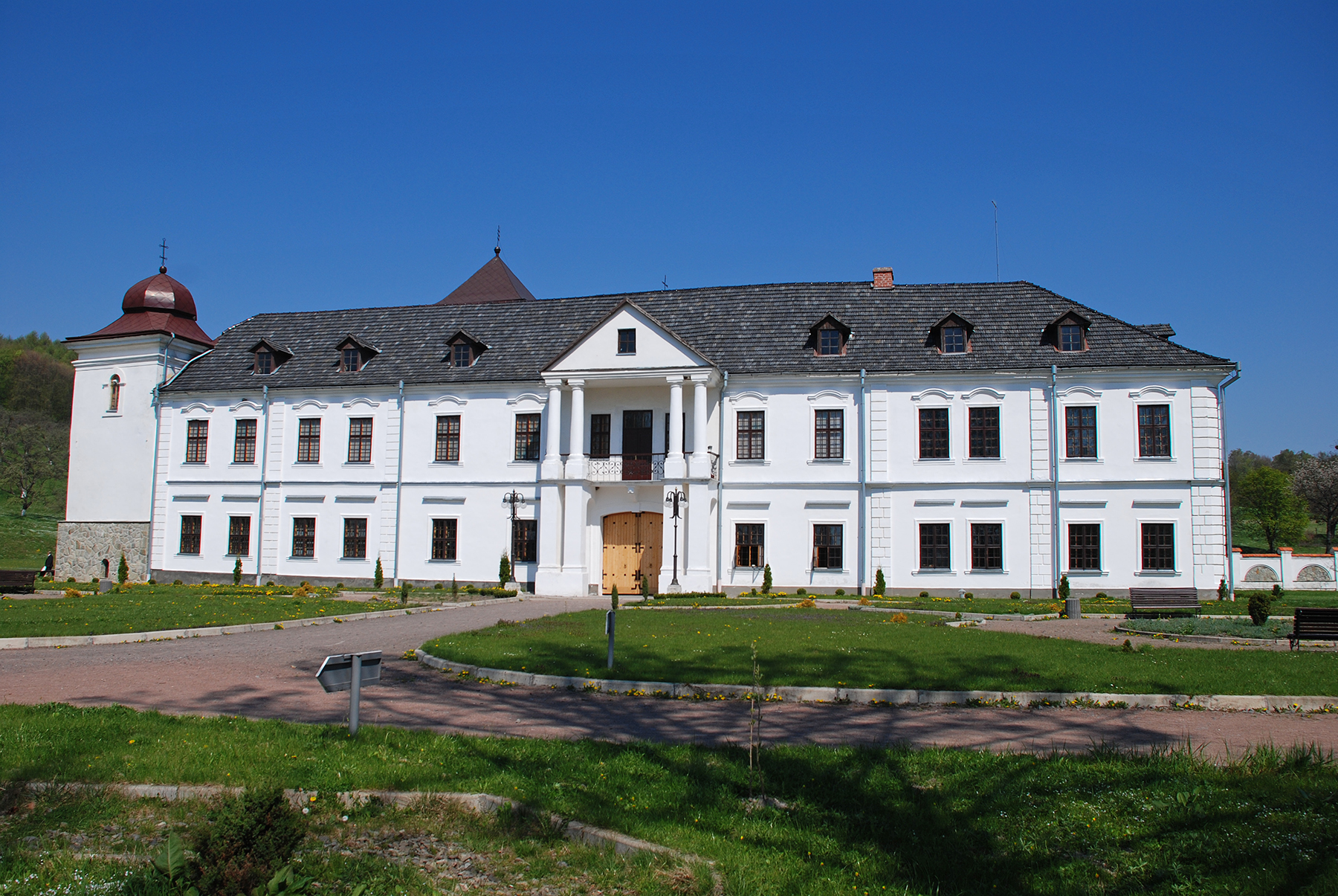 Будинок митрополита (мур.), с.Унів (Міжгір'я)